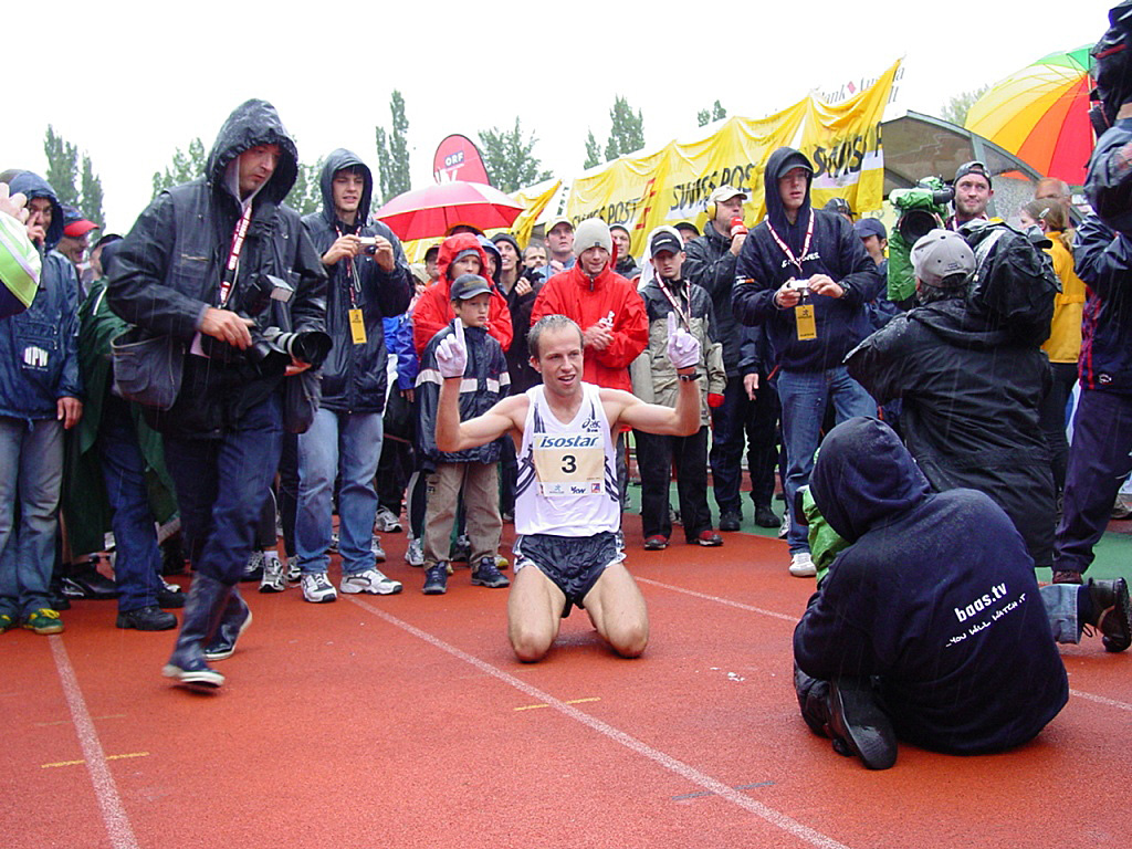 Mykola Rudyk, Sieger des 3-Länder-Marathons 2003 im Ziel (Casinostadion Bregenz).